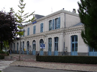 Photo Bruno Robert : "la Gare de Flers"